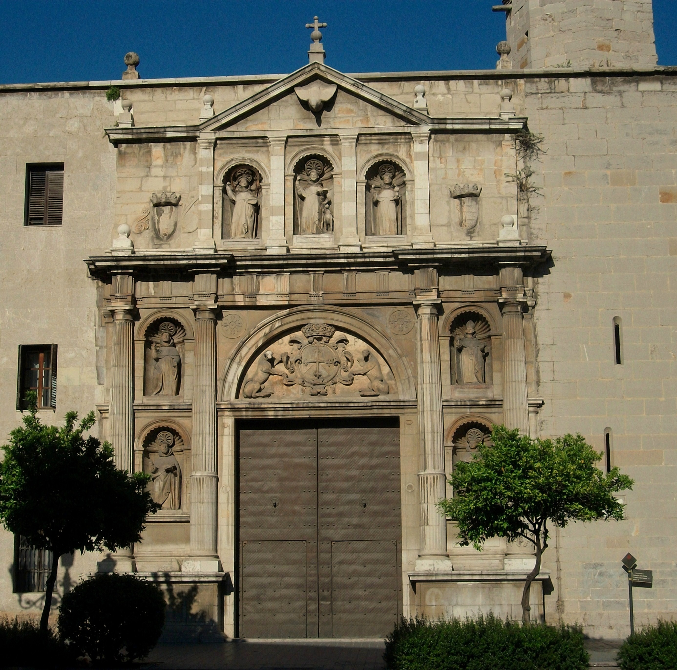 Portada del convent de sant Domingo de València.